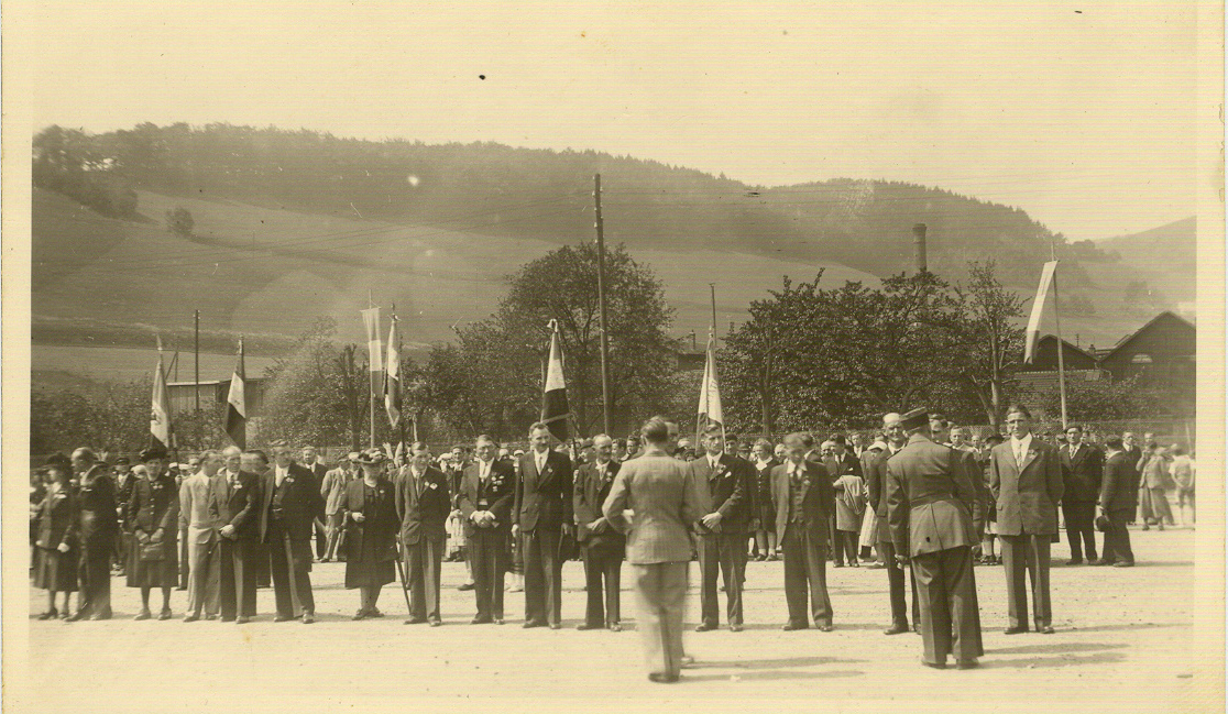 Remise des médailles aux résistants et passeurs de la vallée de Sainte Marie-aux-Mines en 1946 par les autorités militaires